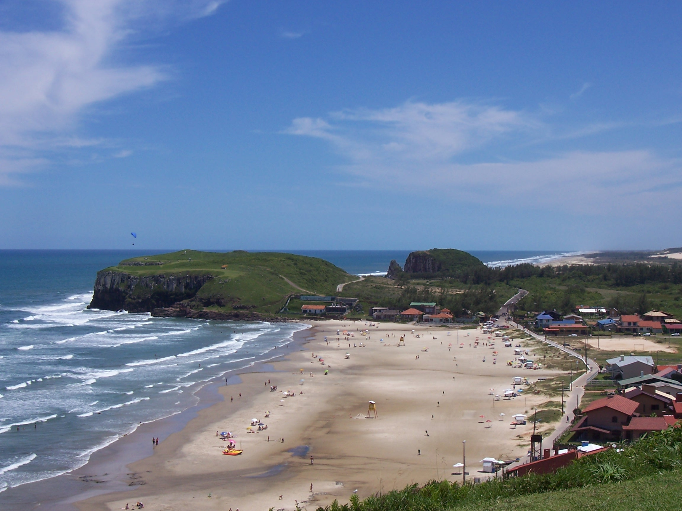 Praia do Cal em Torres, Rio Grande do Sul, Brasil.